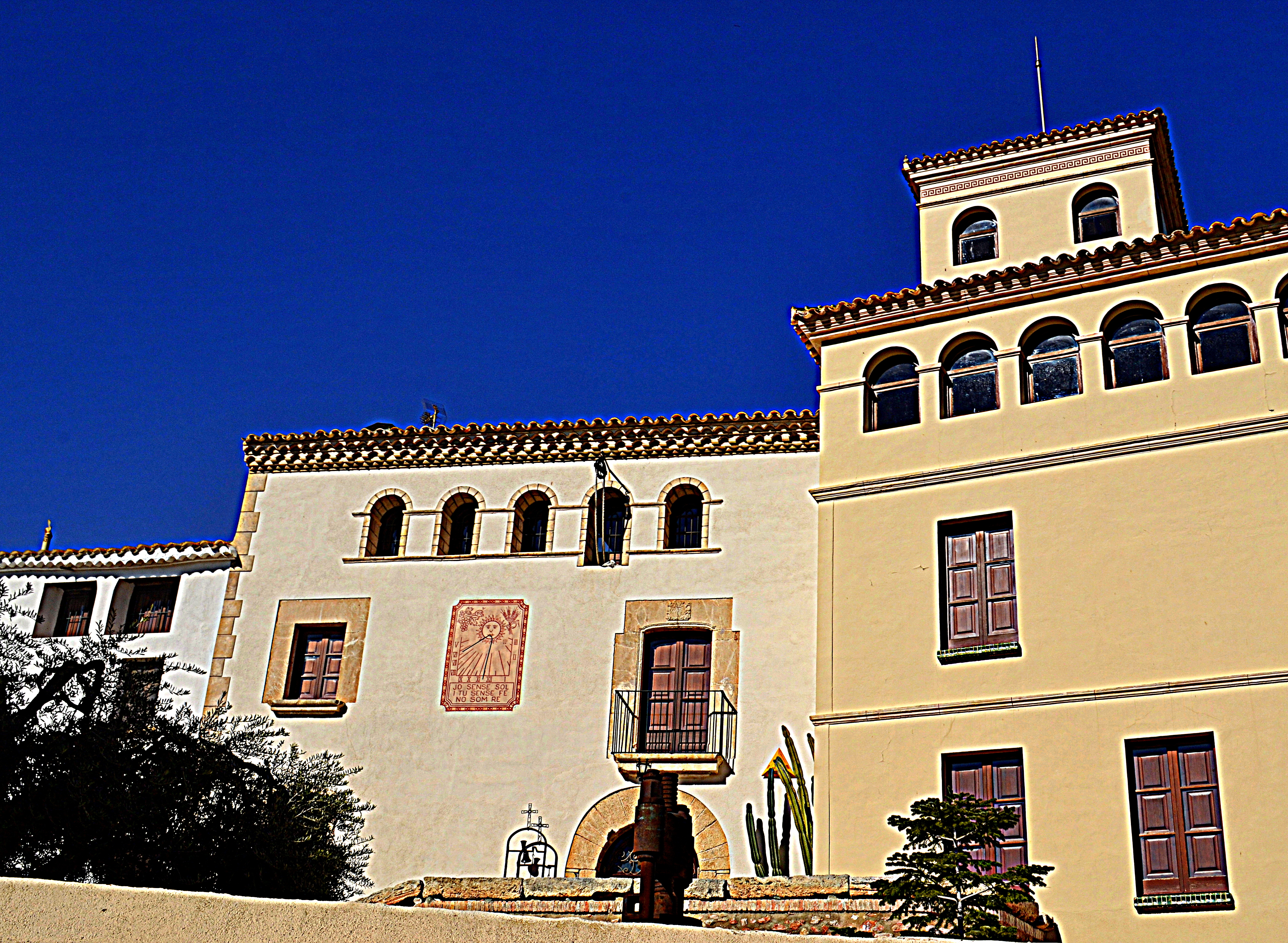 Ca l'Alegret (la Bisbal del Penedès)